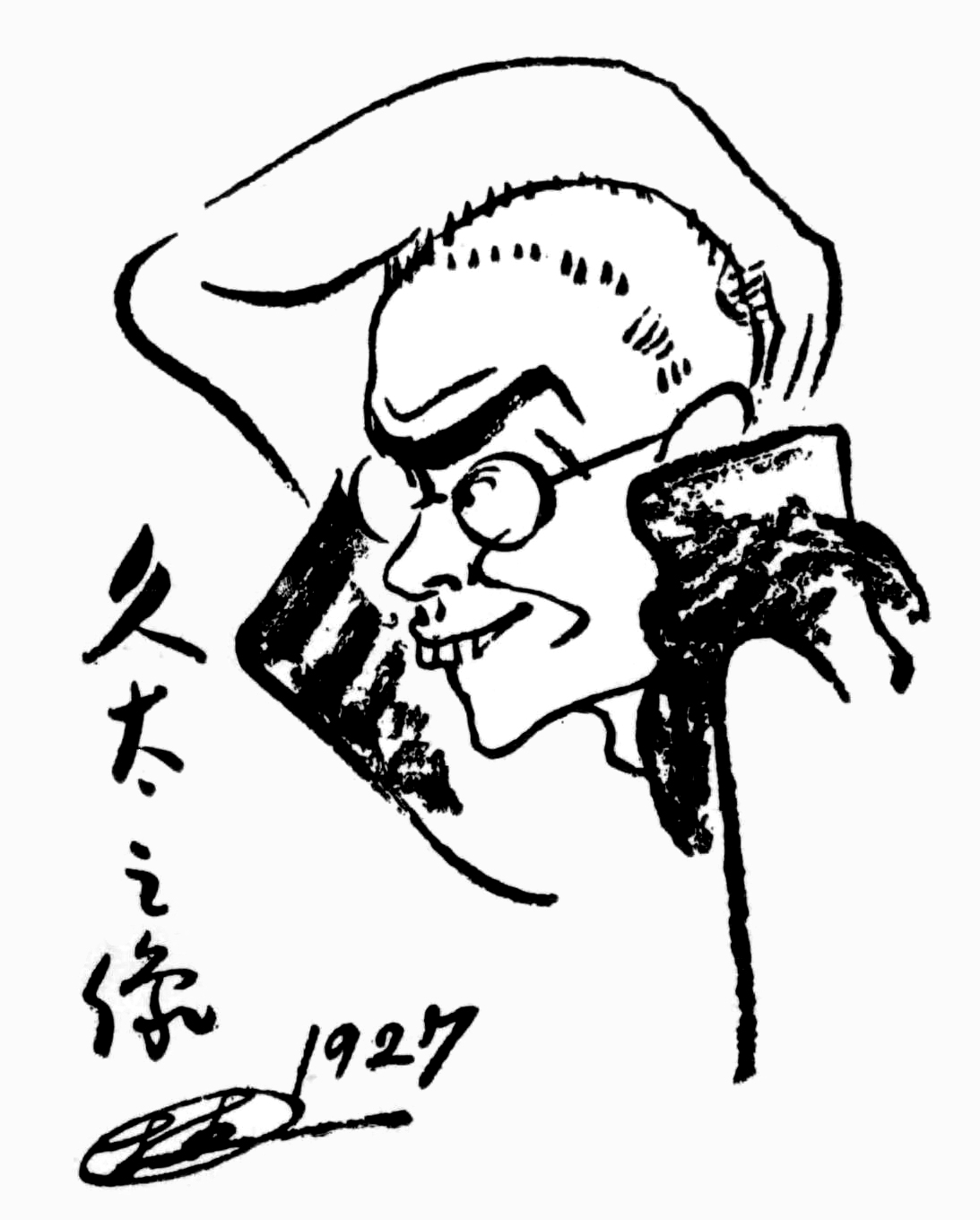 和田久太郎像（望月桂・作）